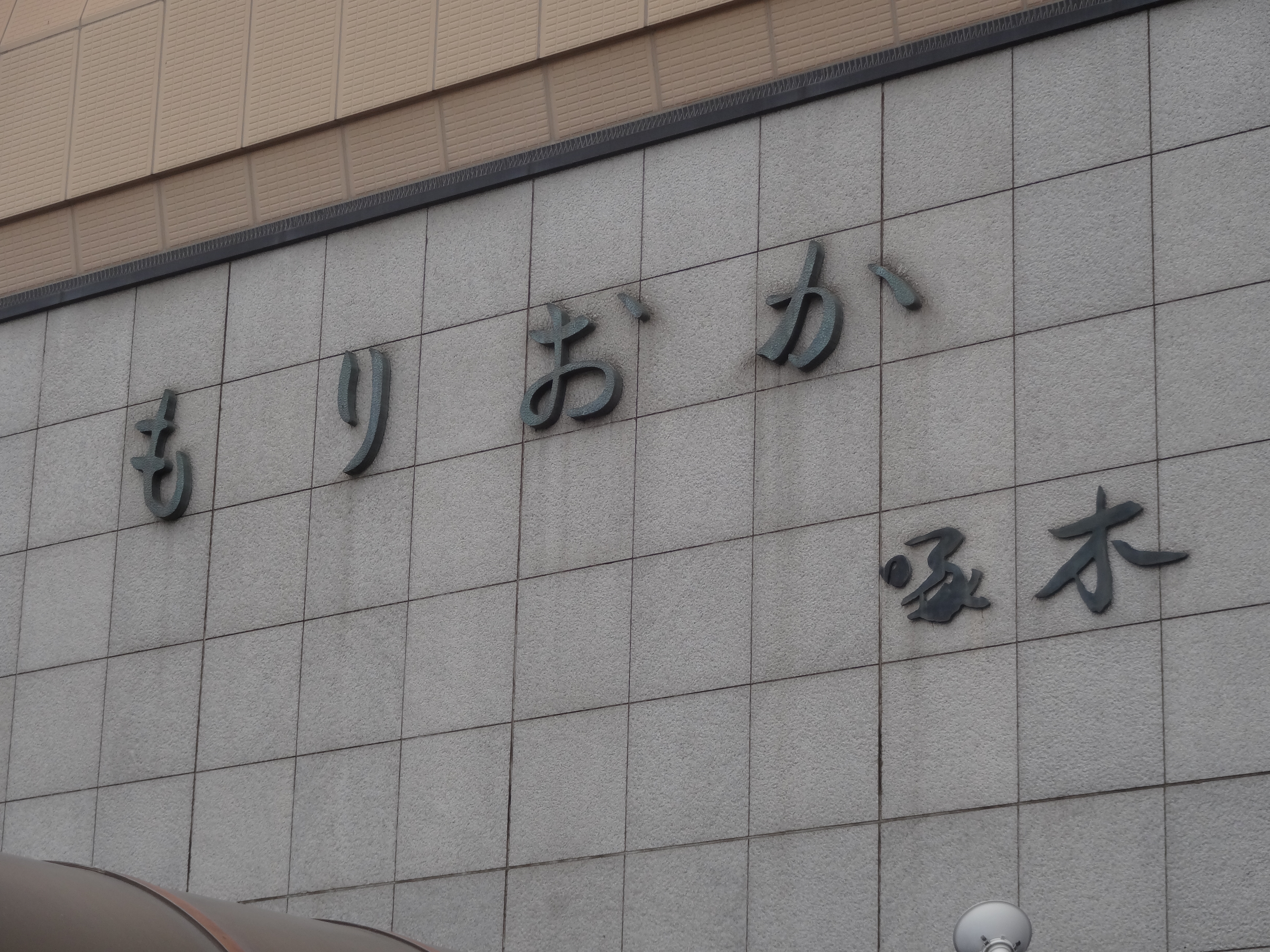 盛岡駅啄木の字